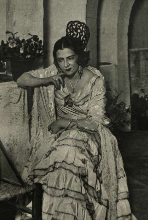 La actriz española Catalina Bárcena en una escena de la obra de teatro Mariquilla Terremoto, de los hermanos Álvarez Quintero